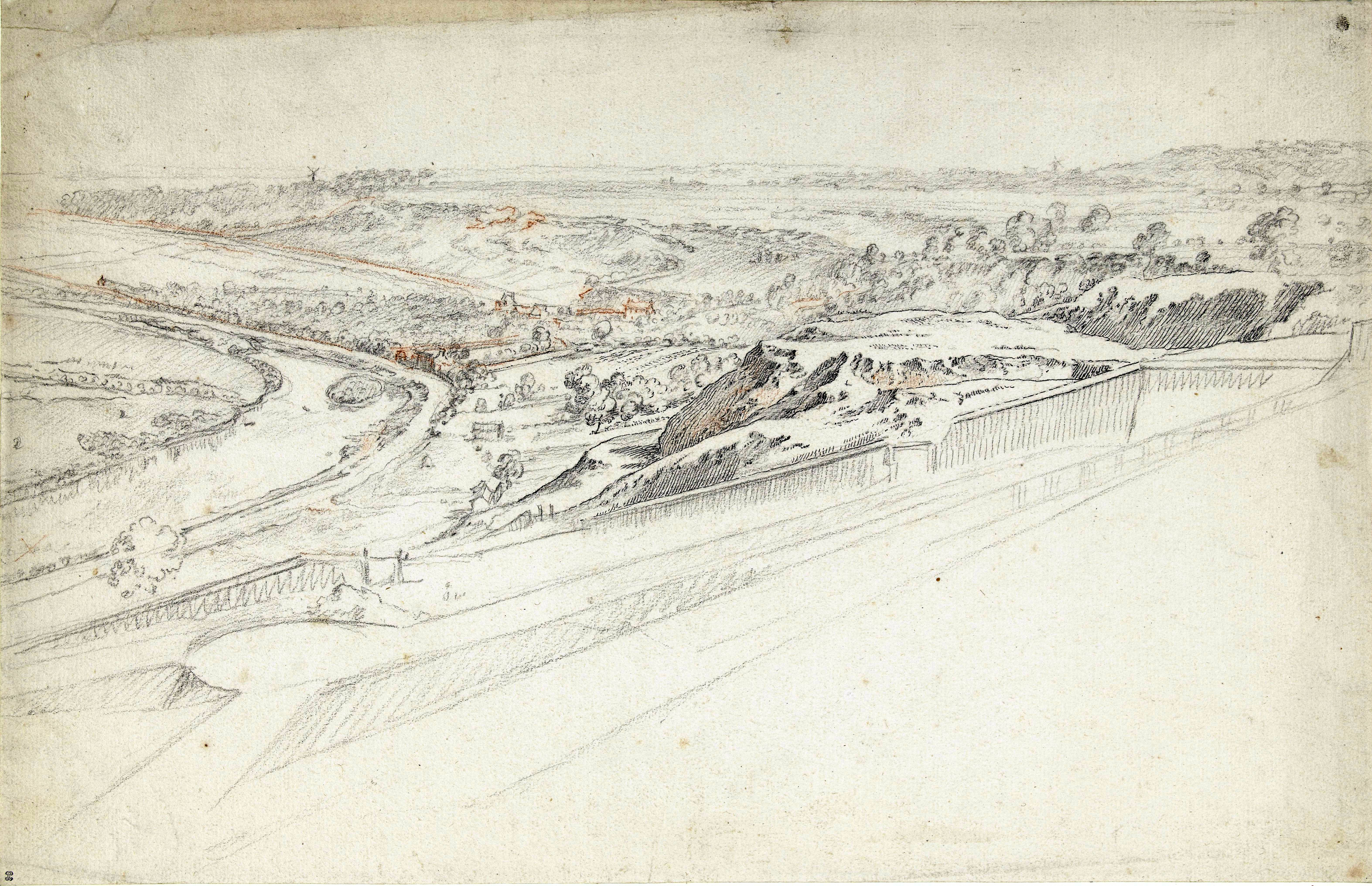 Vue depuis le premier étage du château de Bellevue, en direction de Meudon et Issy. Jacques-André Portail, vers 1755. Rijksmuseum, Amsterdam.